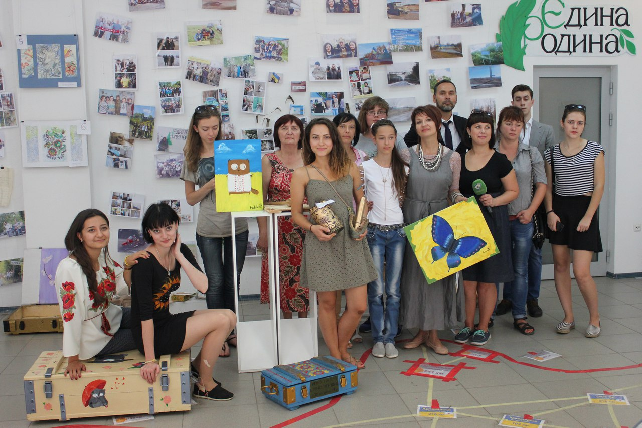 Закриття виставки та проведення аукціону на підтримку дітей у зоні АТО. Організатори БО ВБФ "Єдина Родина" та український народ. Місце проведення: м. Харків, галерея на Костюрінському.